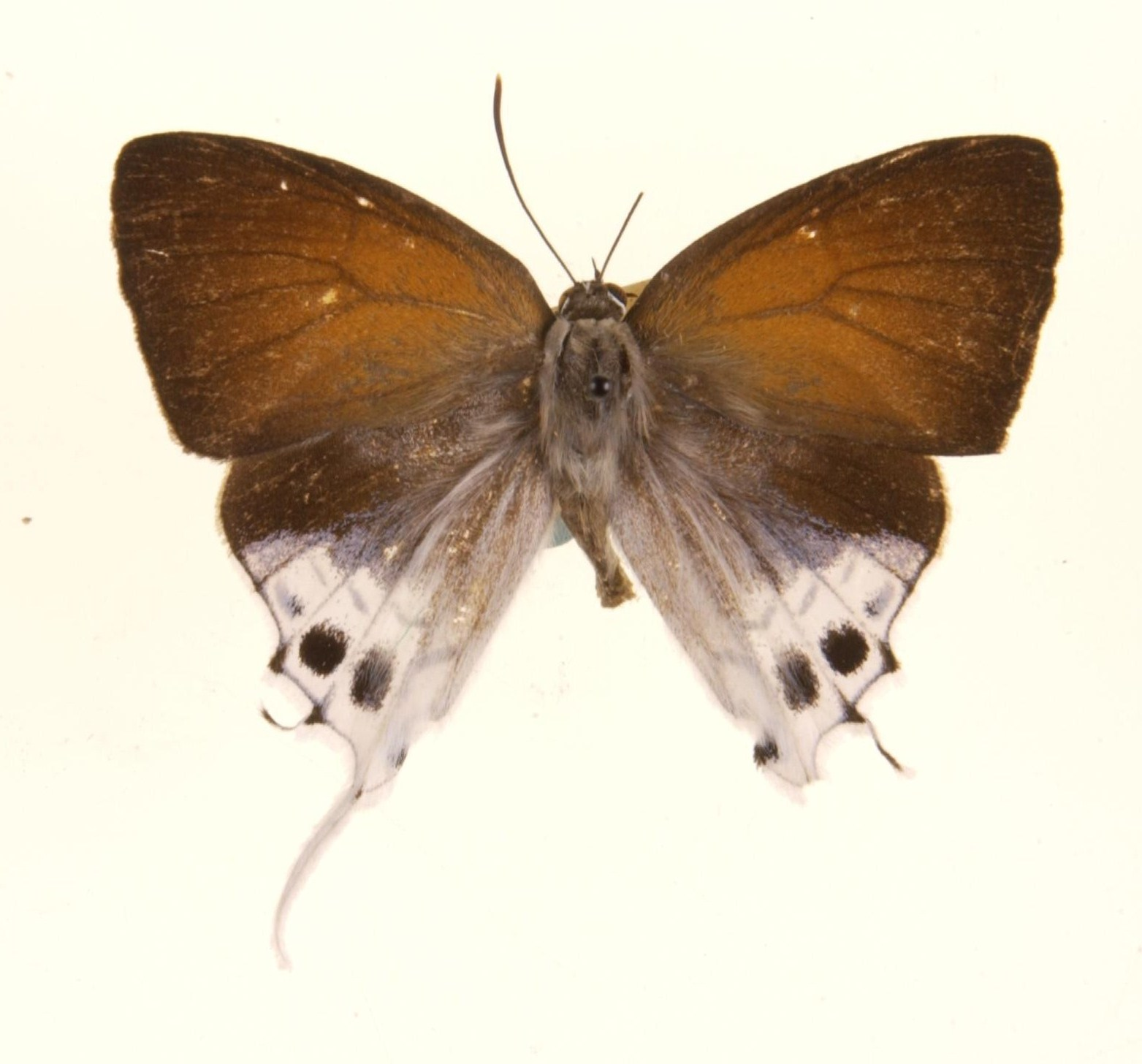 Mantoides gama gama (Distant, 1886) Malaya